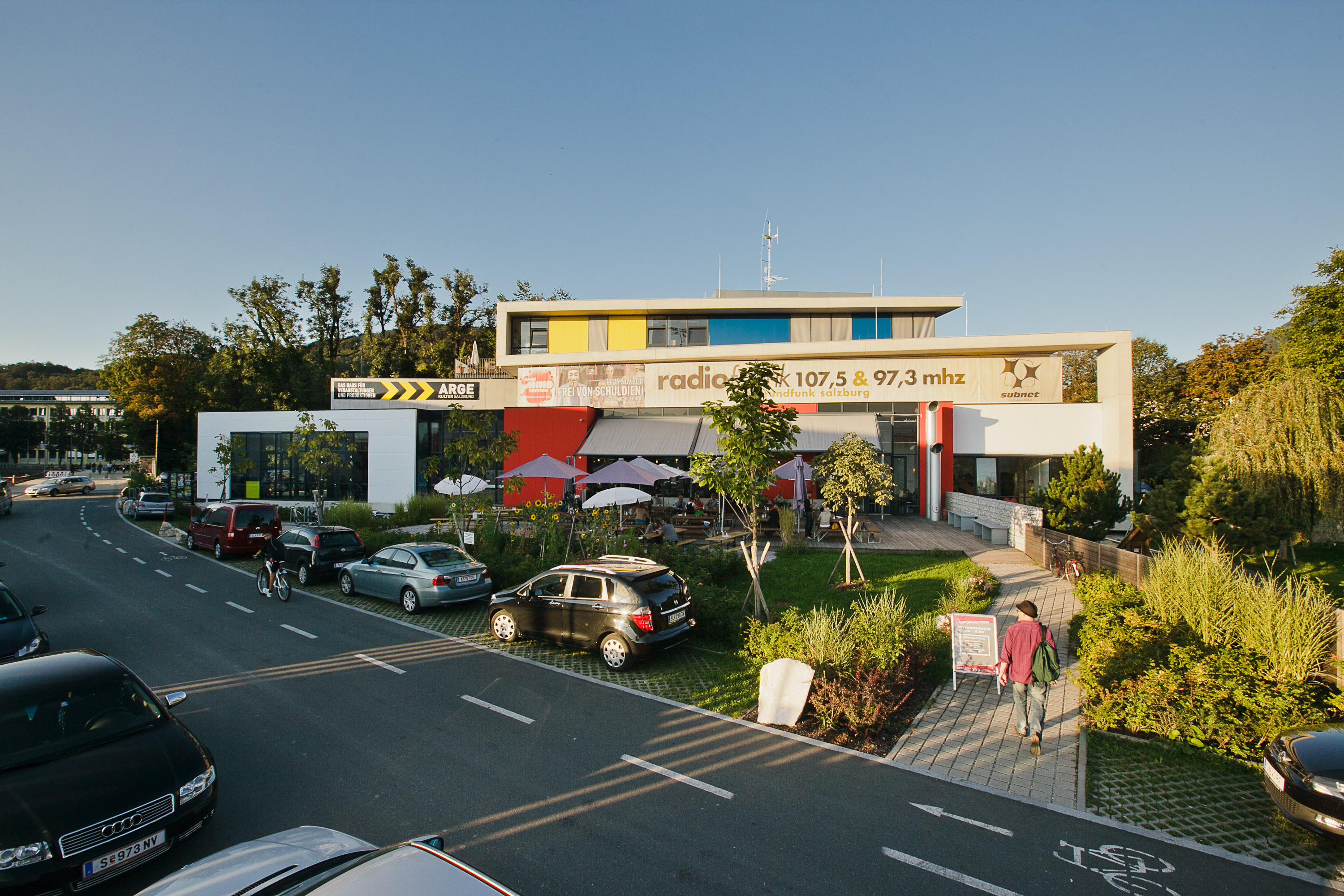 ARGEkultur Südansicht